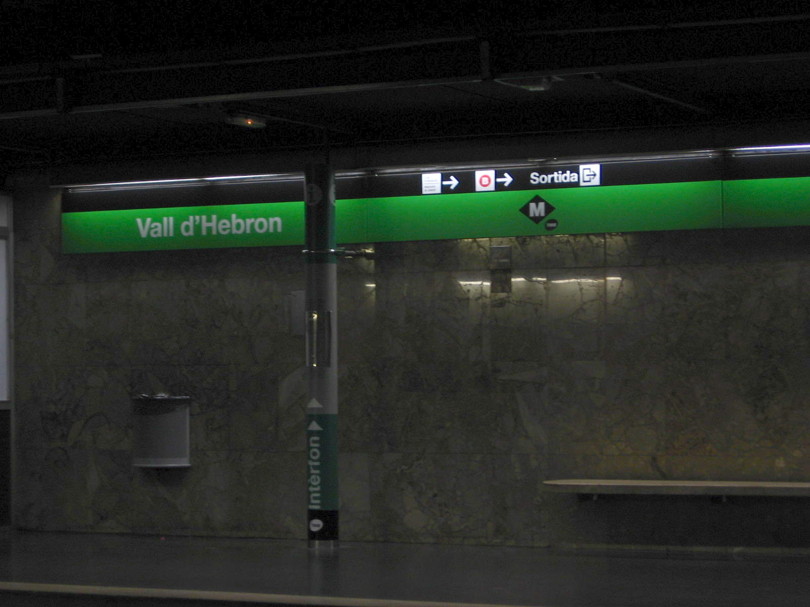 Platform of Vall d'Hebron station, Barcelona Metro/Andana de l'estació Vall d'Hebron, Barcelona